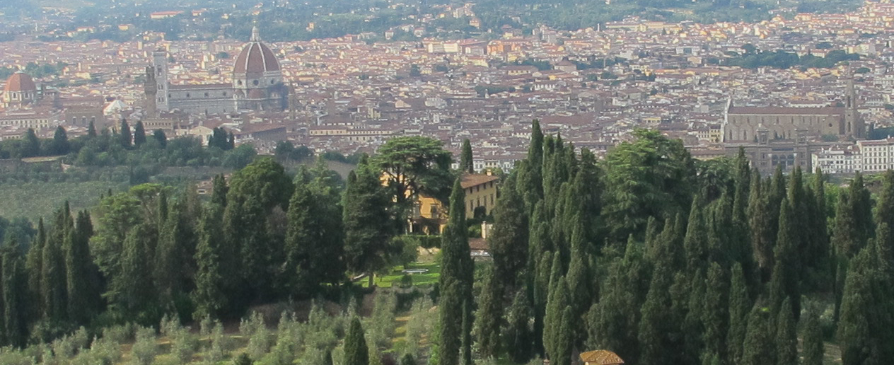 Torre del gallo, veduta, villa giramonte su sfondo firenze